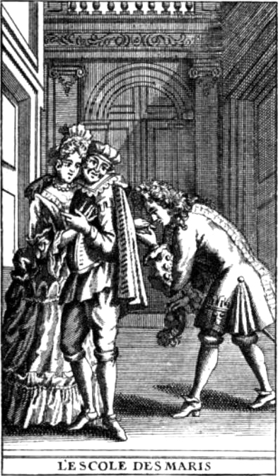 Front page of L'École des maris (1661) by Molière (1622-1673)